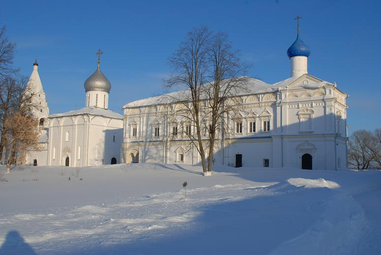 Ансамбль Троицко Данилова монастыря (Ярославская область, Переславль-Залесский, Луговая улица, 7)